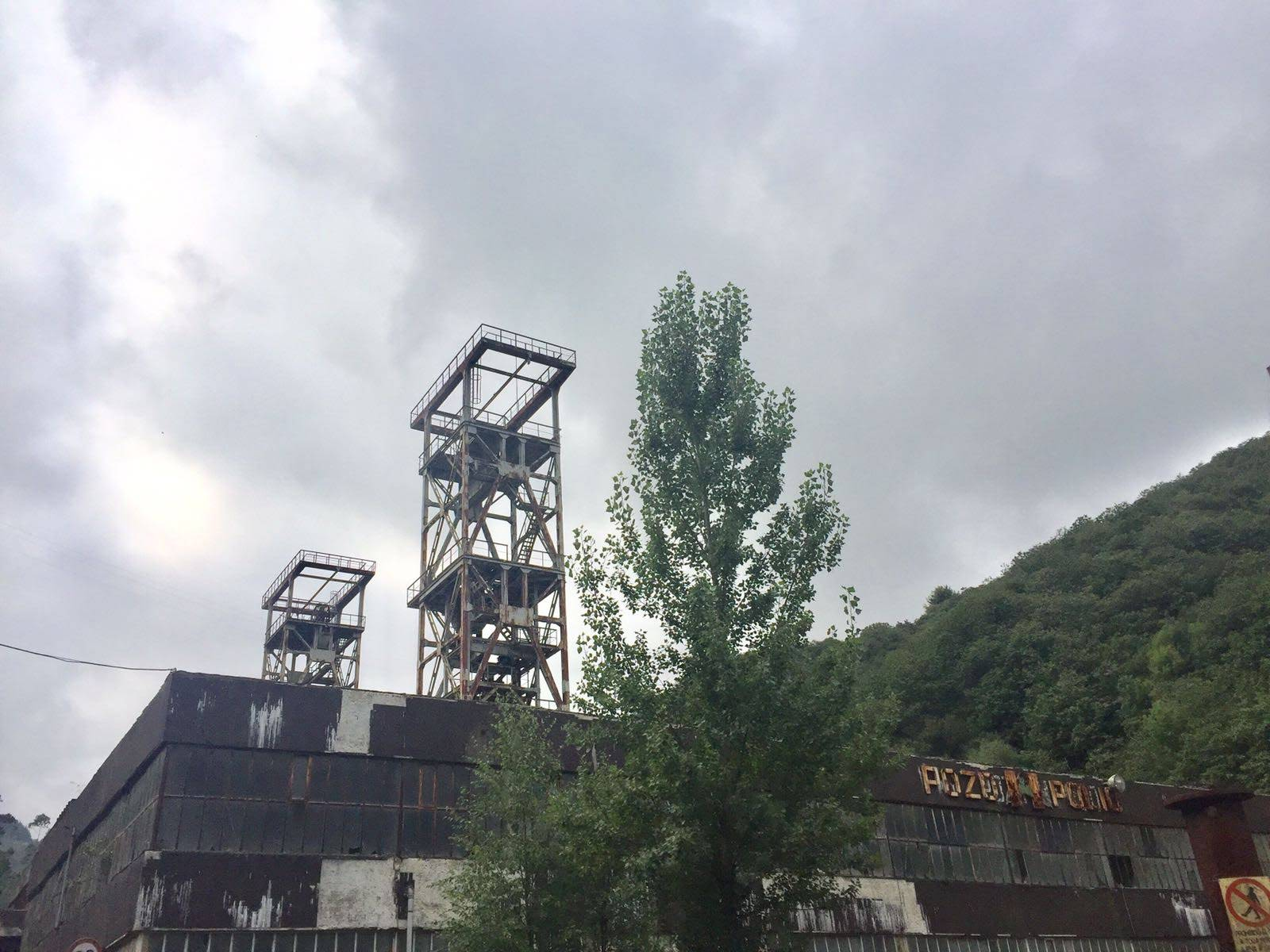 Castilletes del Pozo Polio de Mieres, en Asturias, España